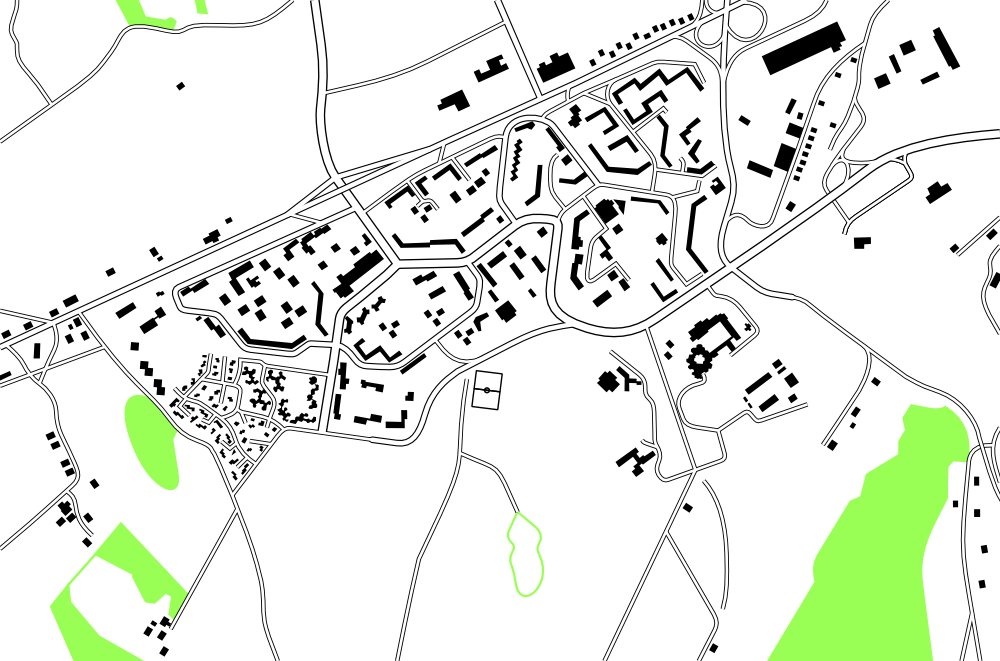 Plan du quartier de Planoise à Besançon réalisé à partir des cadastres de 1980.